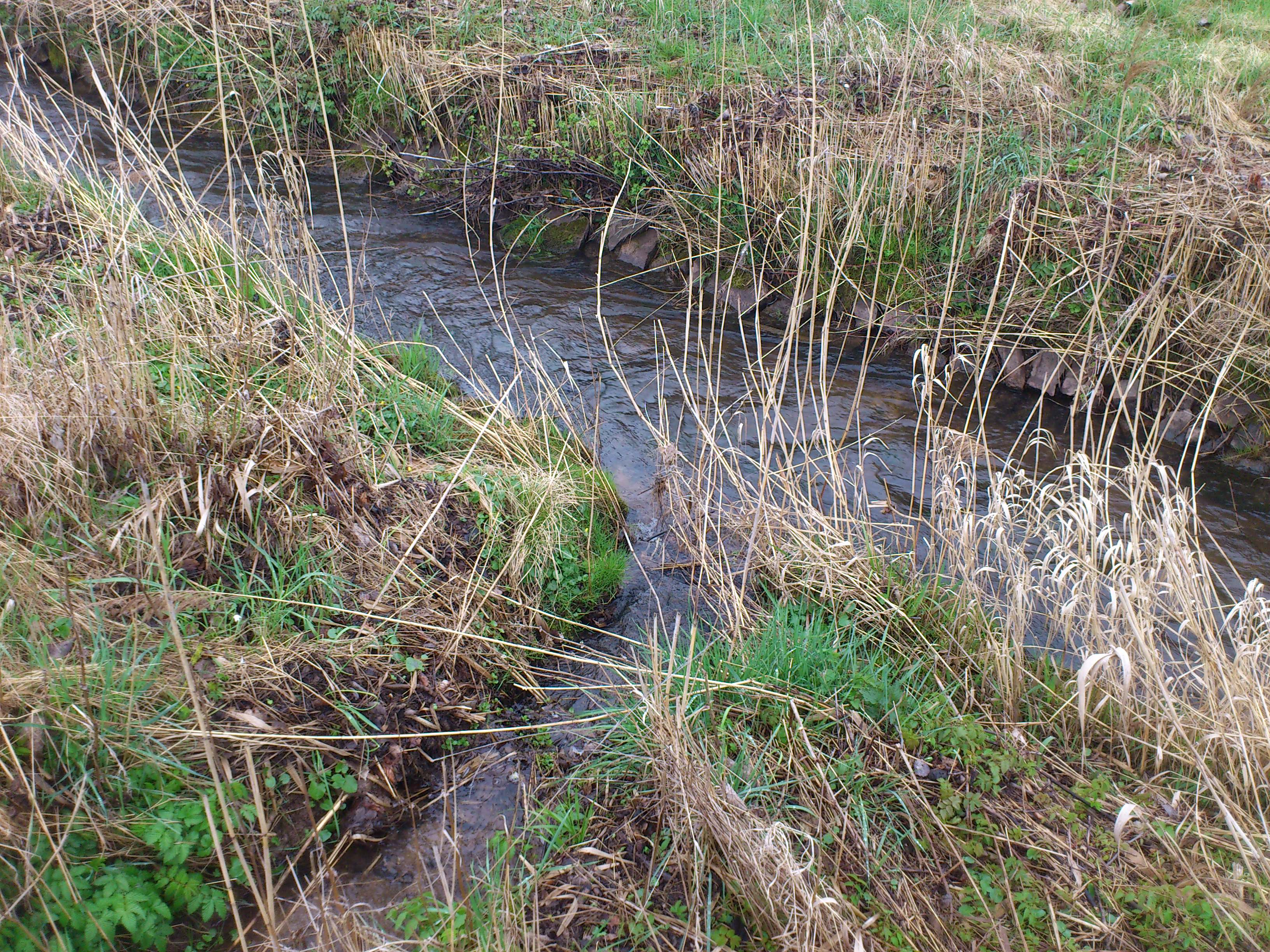 Der Hembach (vorne links) mündet in den linken Arm der Laufach